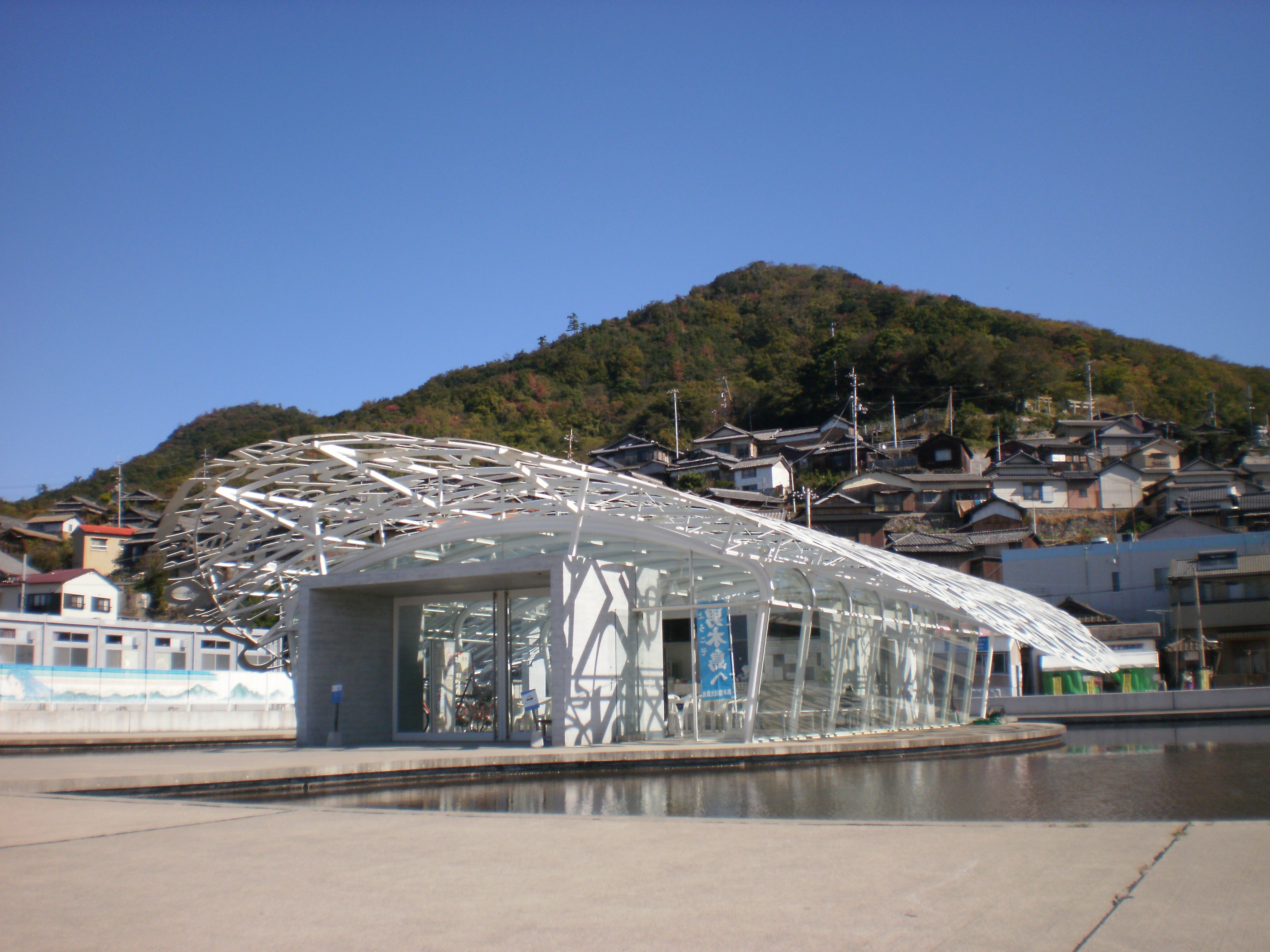 男木島の魂